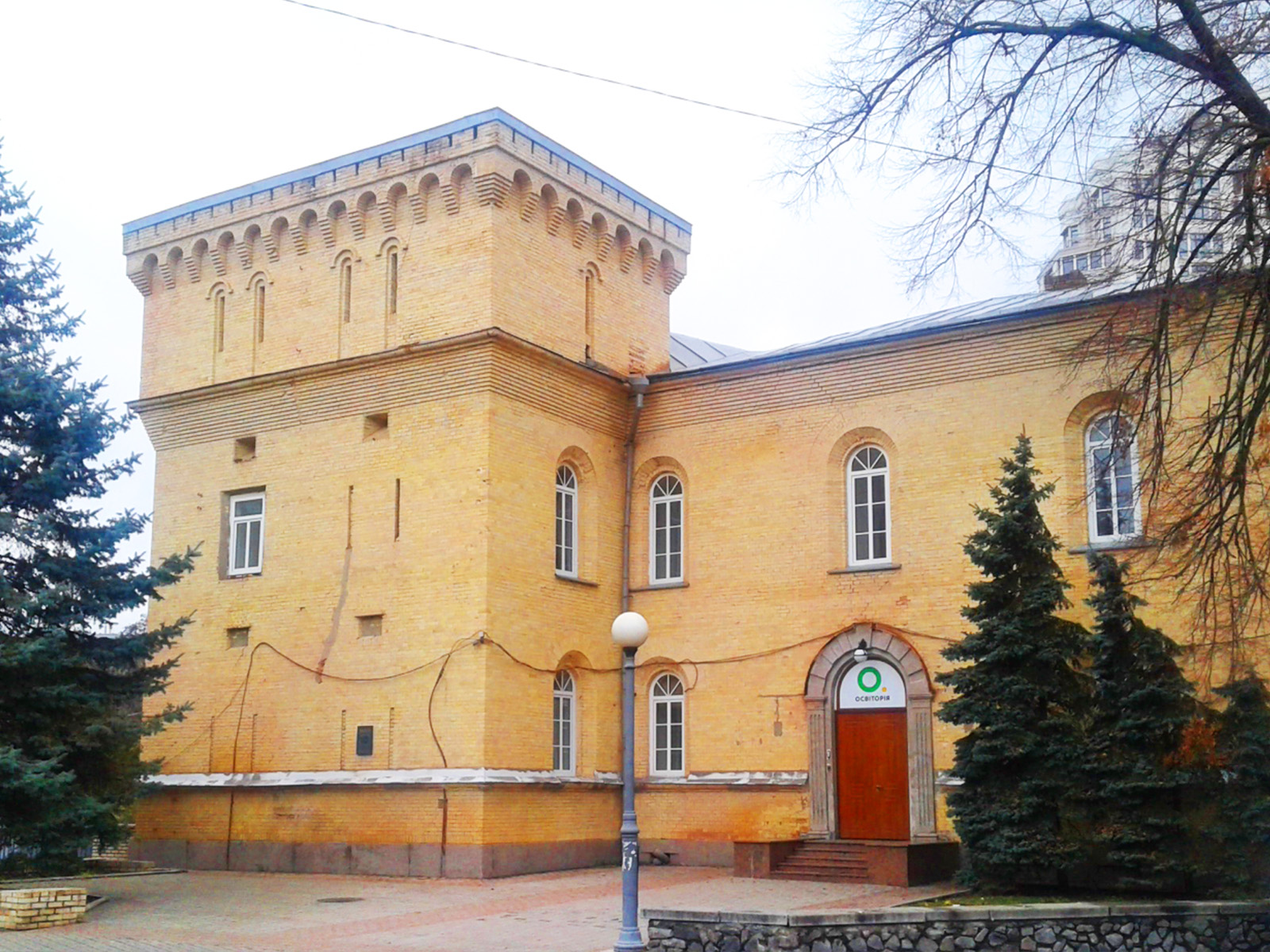 Фортеця з Микільською брамою і казарма, 1846-1850. Київ, вул. Івана Мазепи, 1